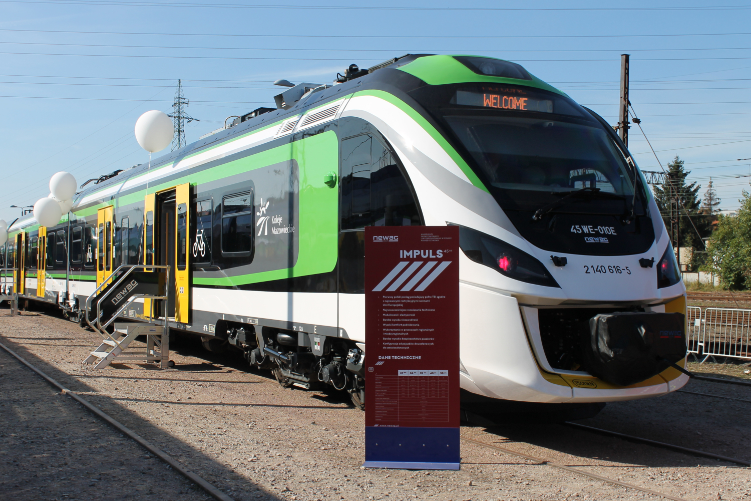 Elektryczny zespół trakcyjny 45WE-010 podczas targów Trako 2015. The making of this document was supported by Wikimedia Polska Association, within Wikigrant no. WG 2015-34.